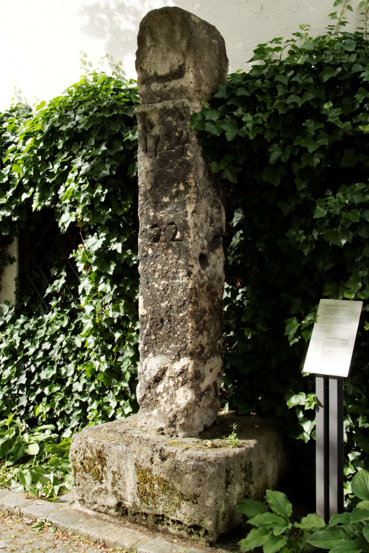 Burgfriedenssäule Nr. 22 des Müncher Burgfriedens, heute im Stadtmuseum